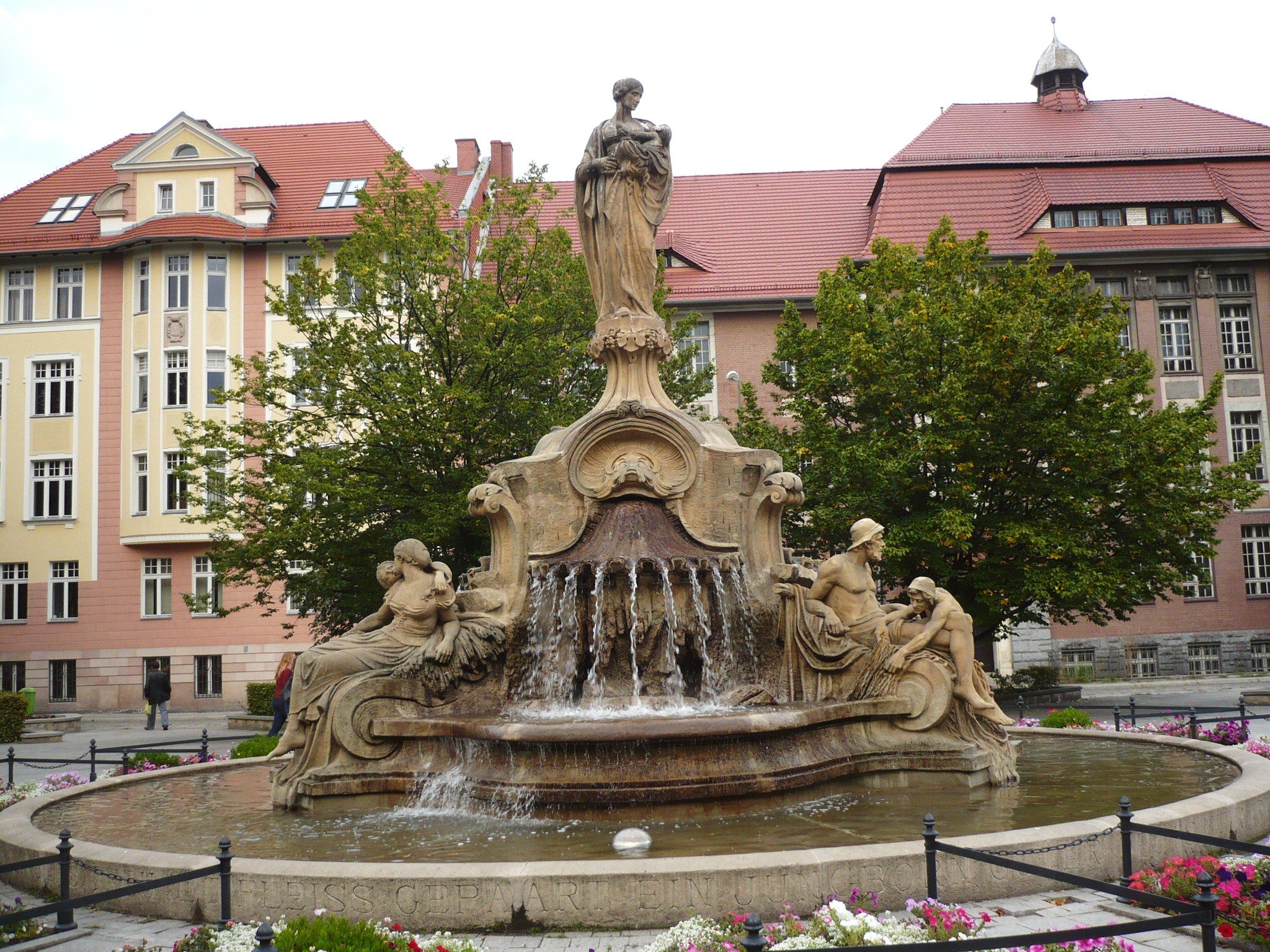 Opole. Fontanna Ceres